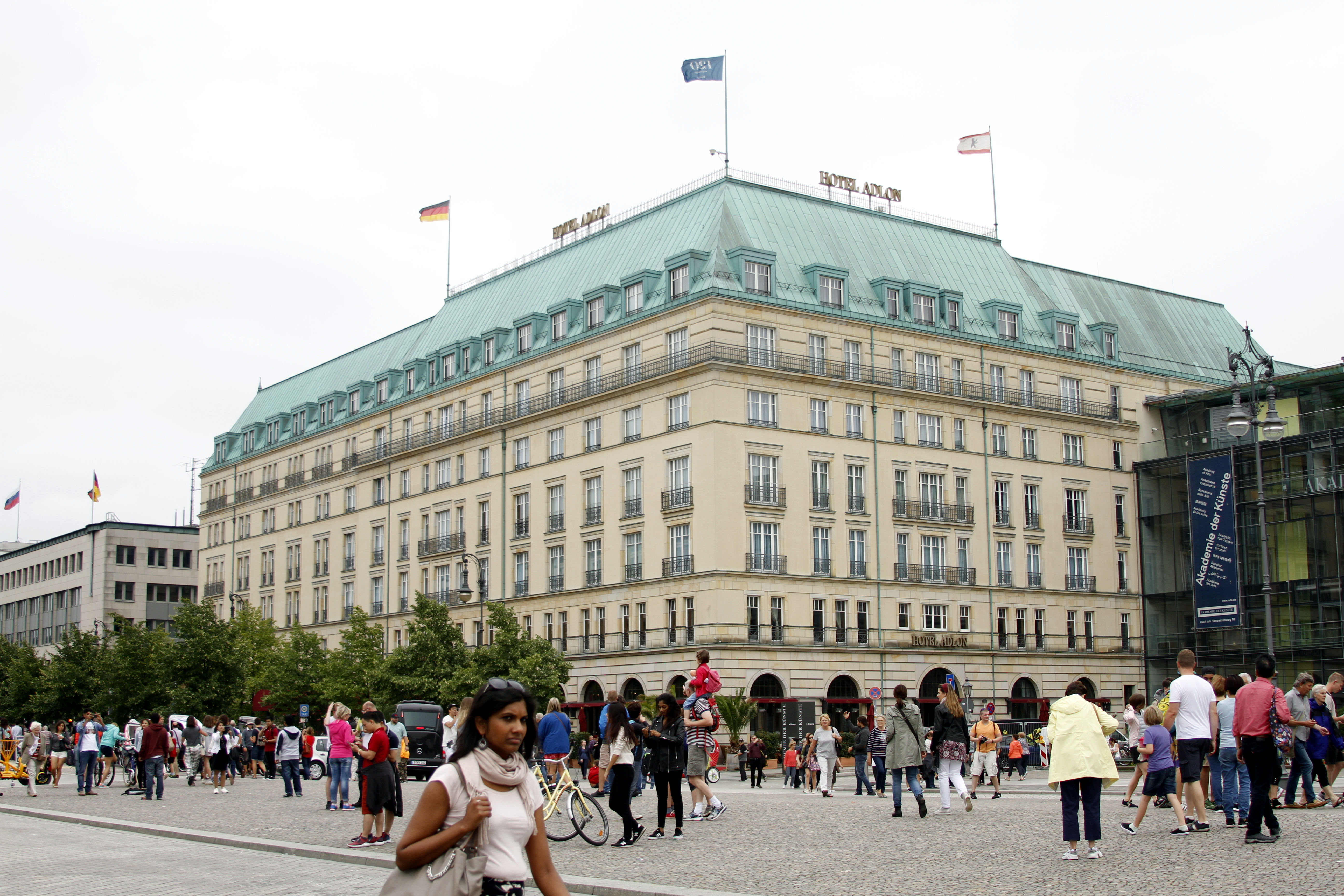 Adlon Hotel - Berlin - Germany